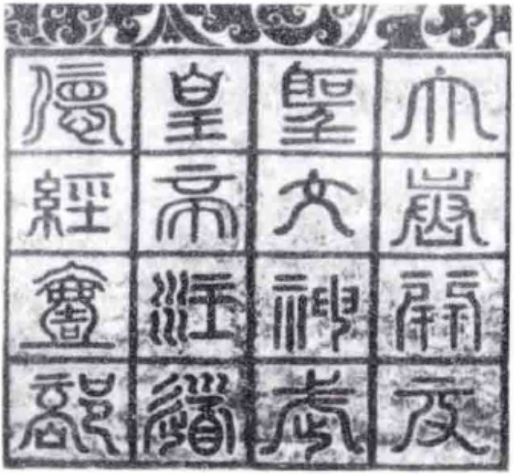 邢台道德经幢碑额拓片